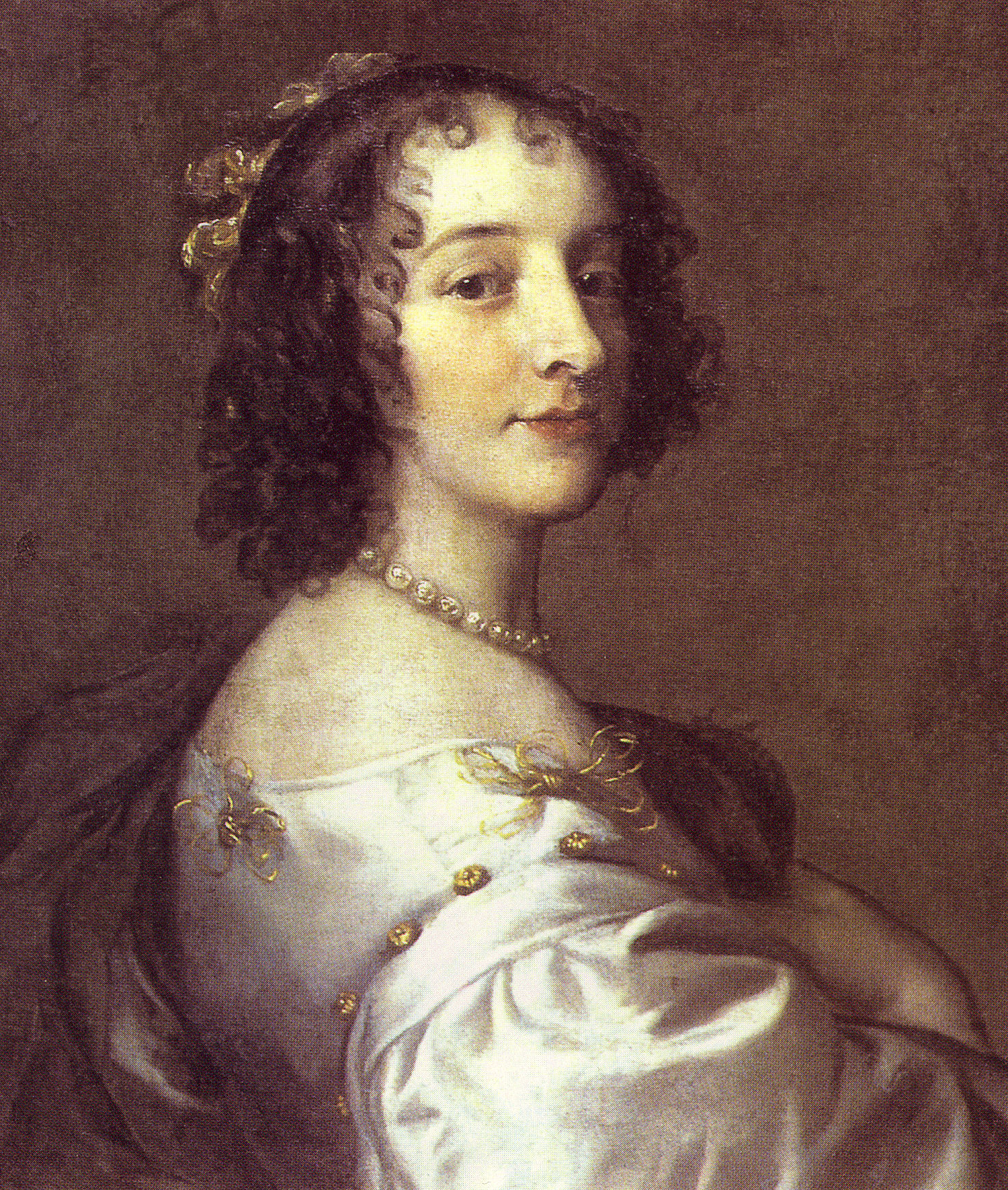 Sophia von Pfalz-Simmern (1630-1714), Tochter des Friedrich V. von der Pfalz, 1658 Heirat mit Ernst August von Hannover